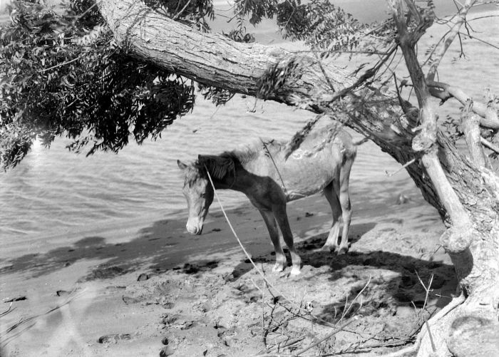 Negatief. Paard aan strand, Bali